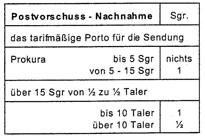 1852 Tarif für Nachnahme in Preußen